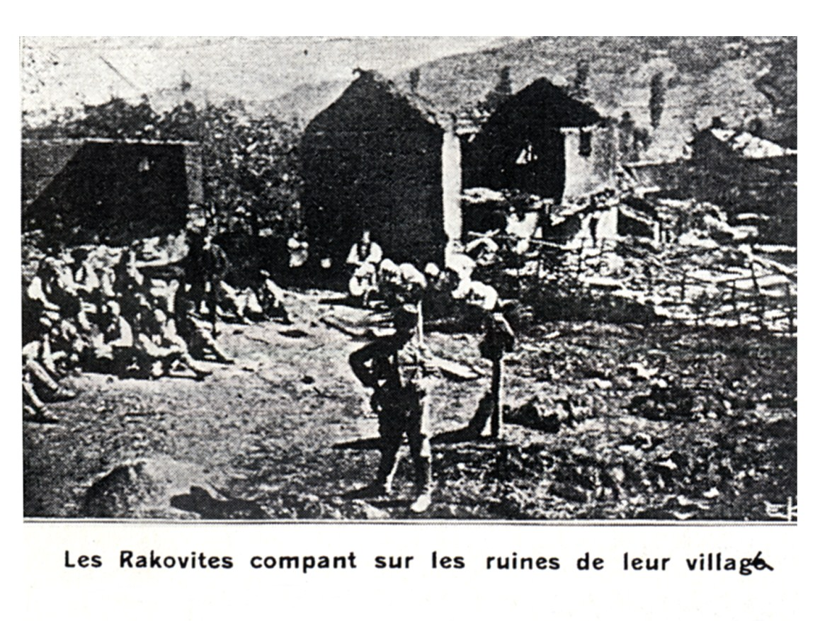 Руини на опожареното при потушаването на Илинденско-Преображенското въстание Раково